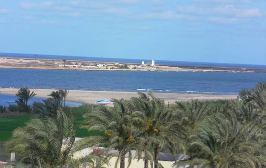 من تصوير دكتور محمد محروس